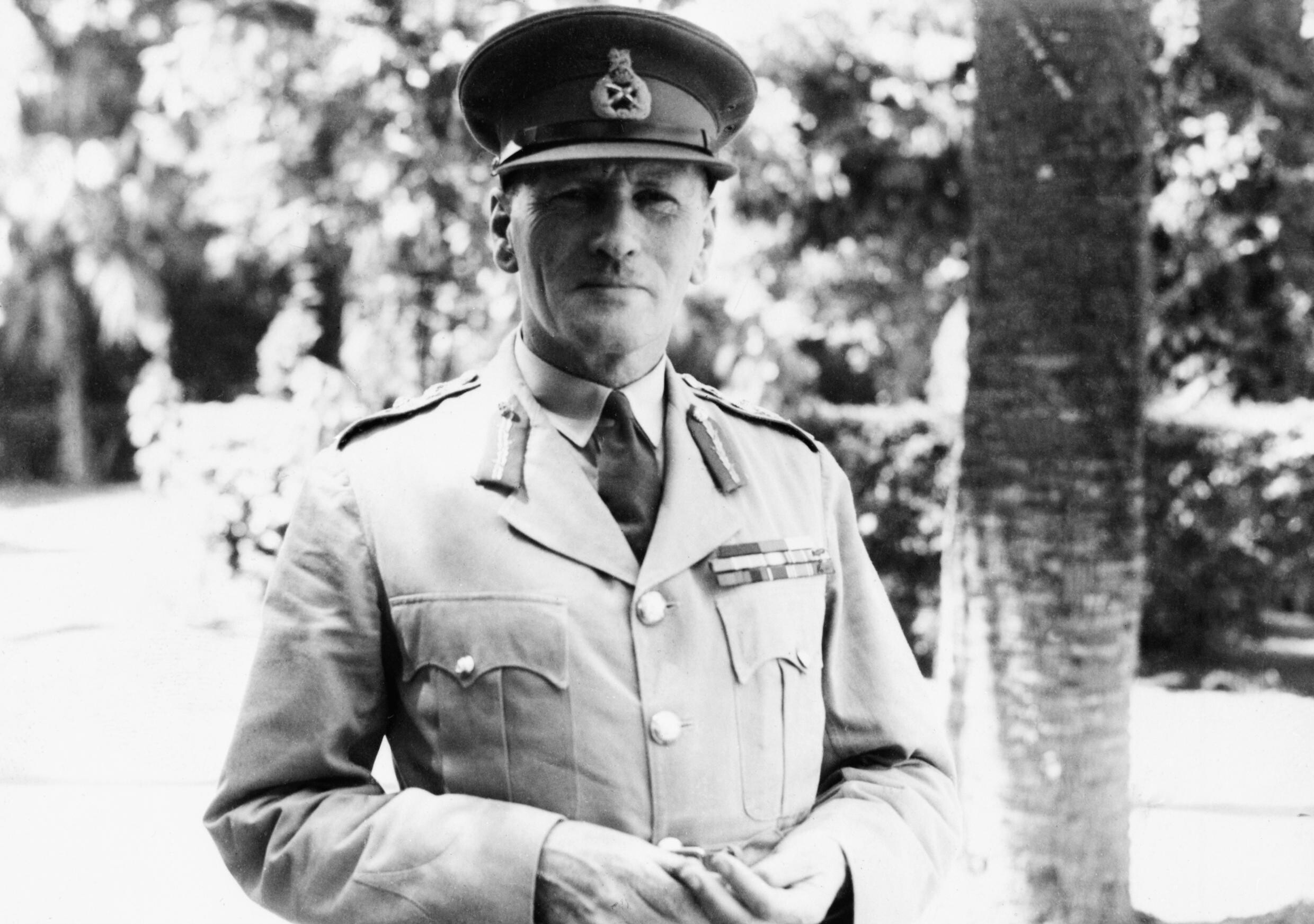 General Sir Claude Auchinleck, Commander-in-Chief, Middle East during June 1941 - August 1942.